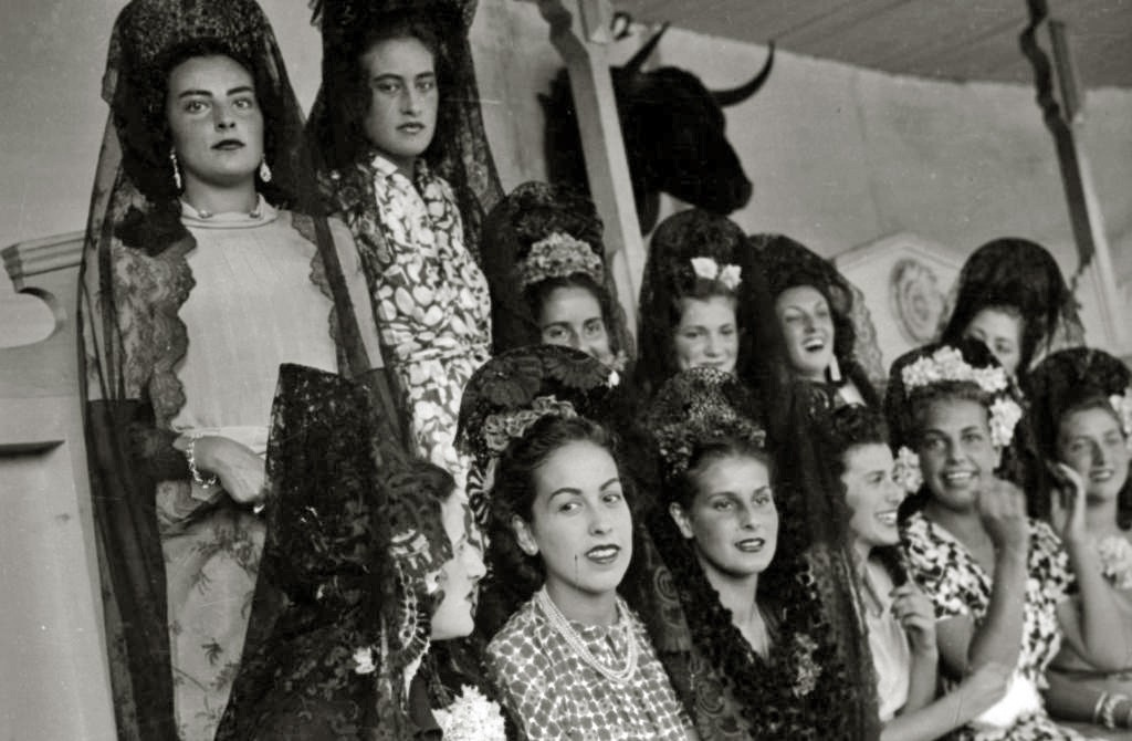 Título original: Festejos en la plaza de Tolosa, en los que torean por primera vez Antonia y Cecilia Urquijo (12/19) Localización: Tolosa (Guipúzcoa)